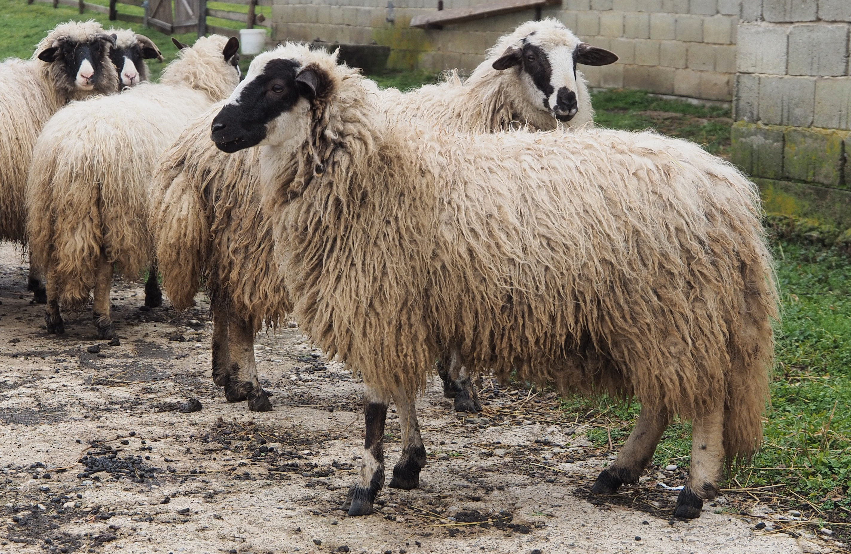 Srpski (latinica): Pramenka (Bosna)